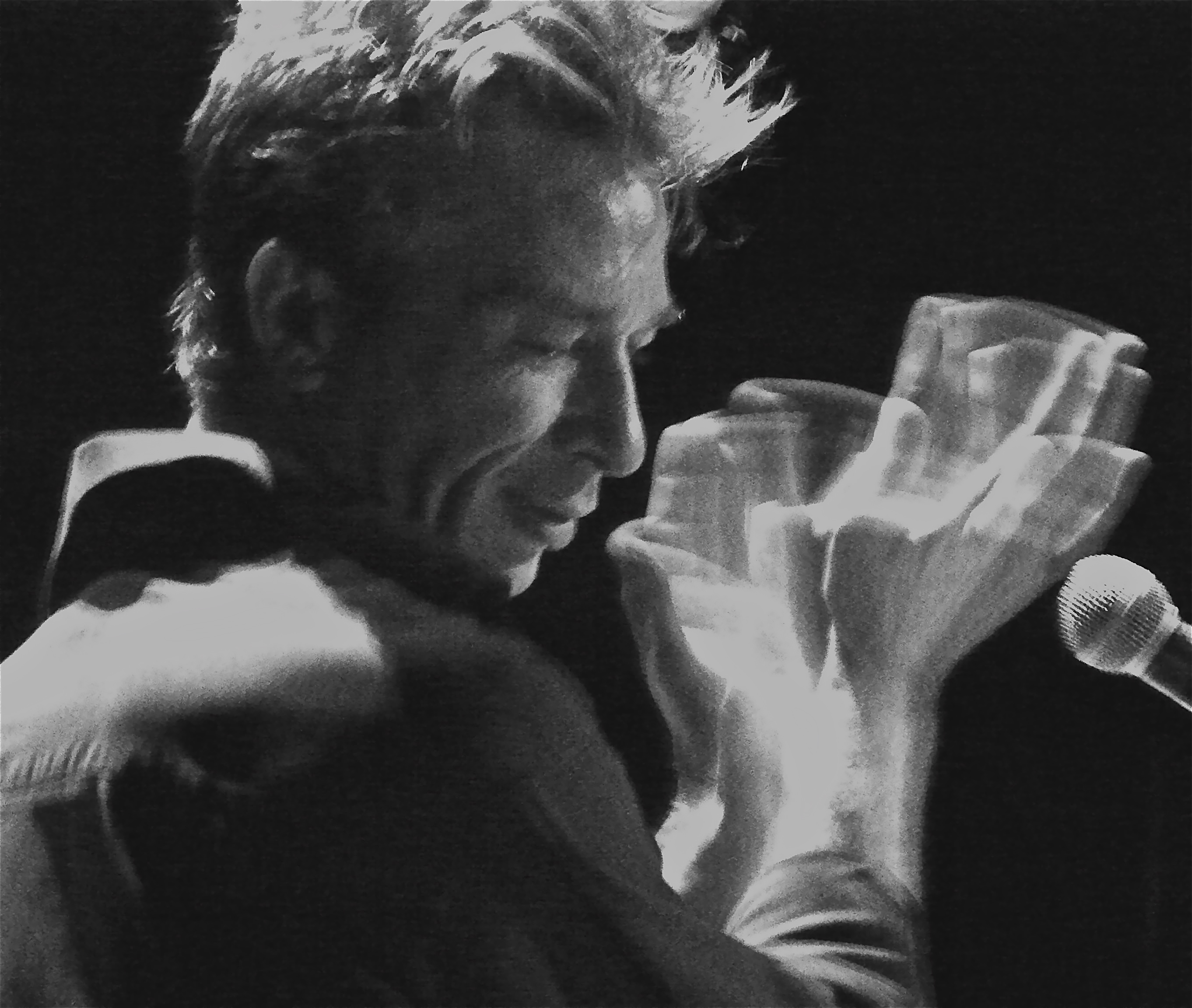 Xavier Desandre Navarre live